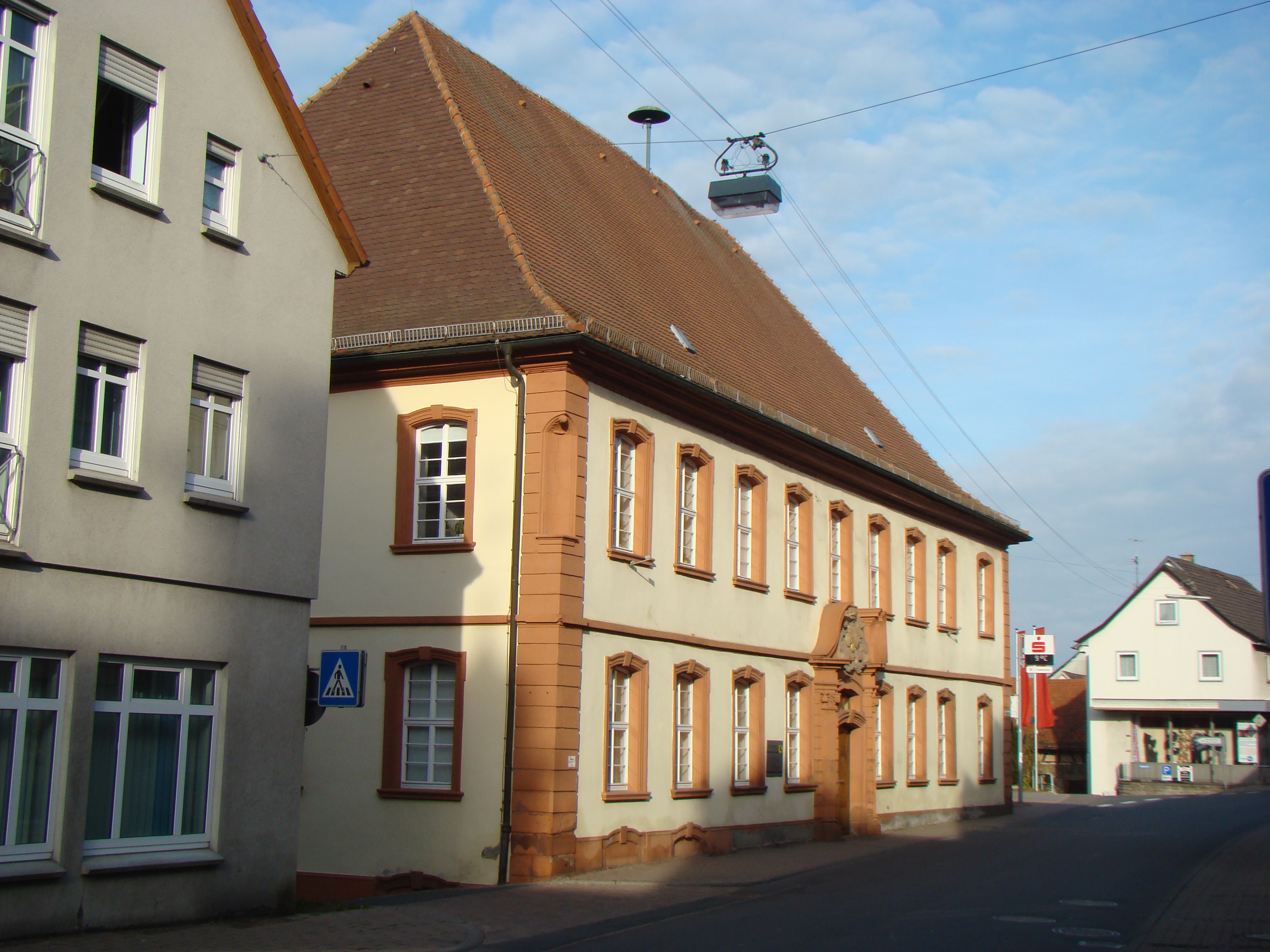 Boxberg (Baden), Kurpfälzisches Amtshaus, zweigeschossiger neunachsiger Bau mit rustizierten Kanten und mächtigem Walmdach, Barockportal mit geschwungenem, gebrochenem Giebel, nach 1747 durch Franz Wilhelm Rabaliatti errichtet. Später Sitz des badischen Bezirksamtes Boxberg, heute Rathaus der Stadt Boxberg.